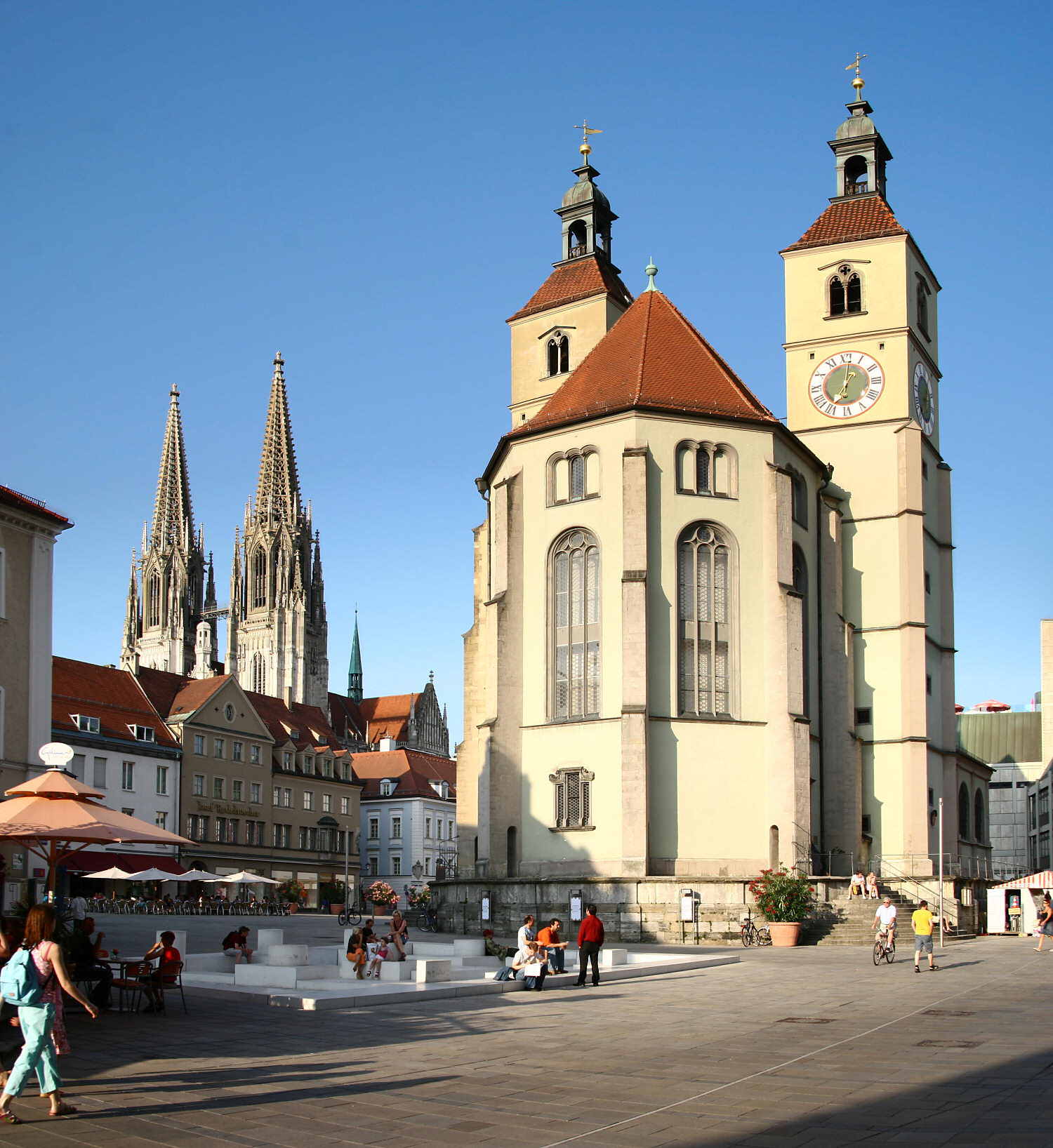 Beschreibung: Regensburg Neupfarrplatz Quelle: selbst fotografiert Datum: Juni 2006 Fotograf: Karsten Dörre (grizurgbg)